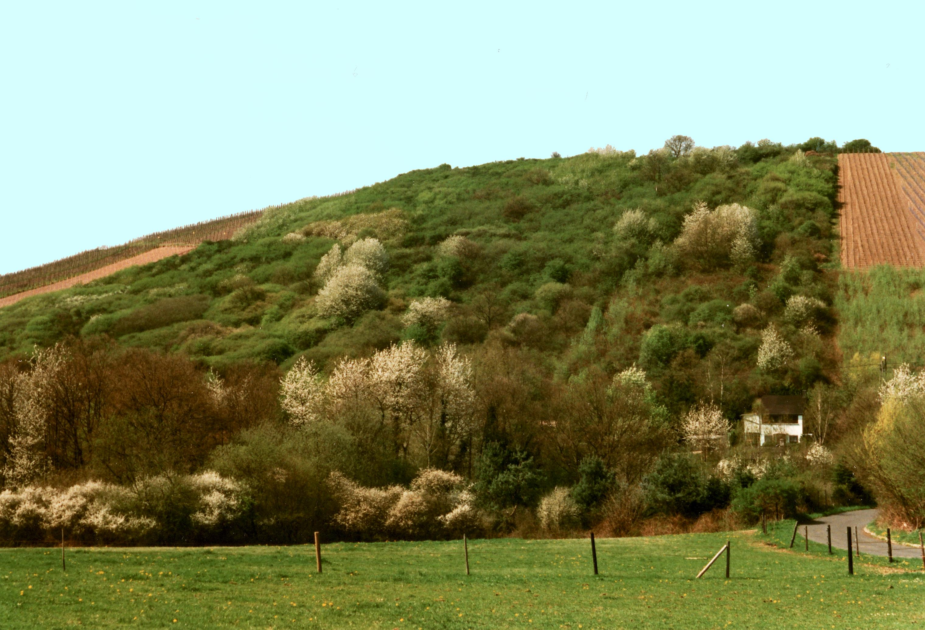 Weinbergsbrache im Gebüsch-Stadium am Geisberg bei Trier-Olewig. Die Weinberge wurden in den 1960er-Jahren ausgehauen und brach liegen gelassen. Die hellen Sträucher sind Wildkirschen in der Blüte.